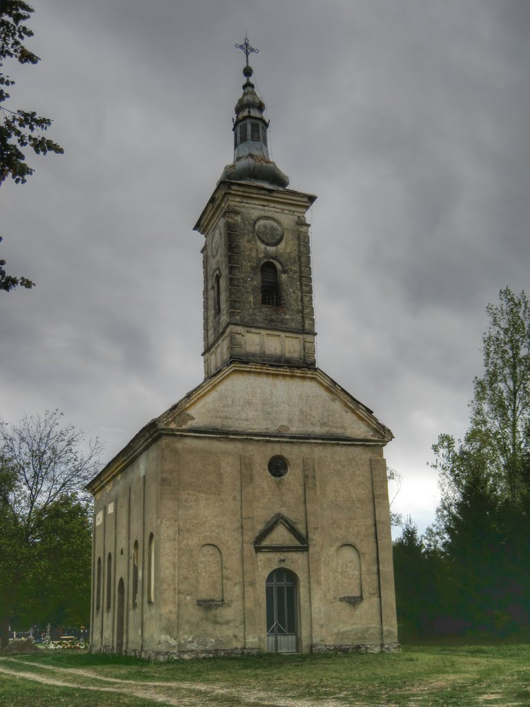 Храм у Разбоју (Гламочани) Аутор: Сузанија